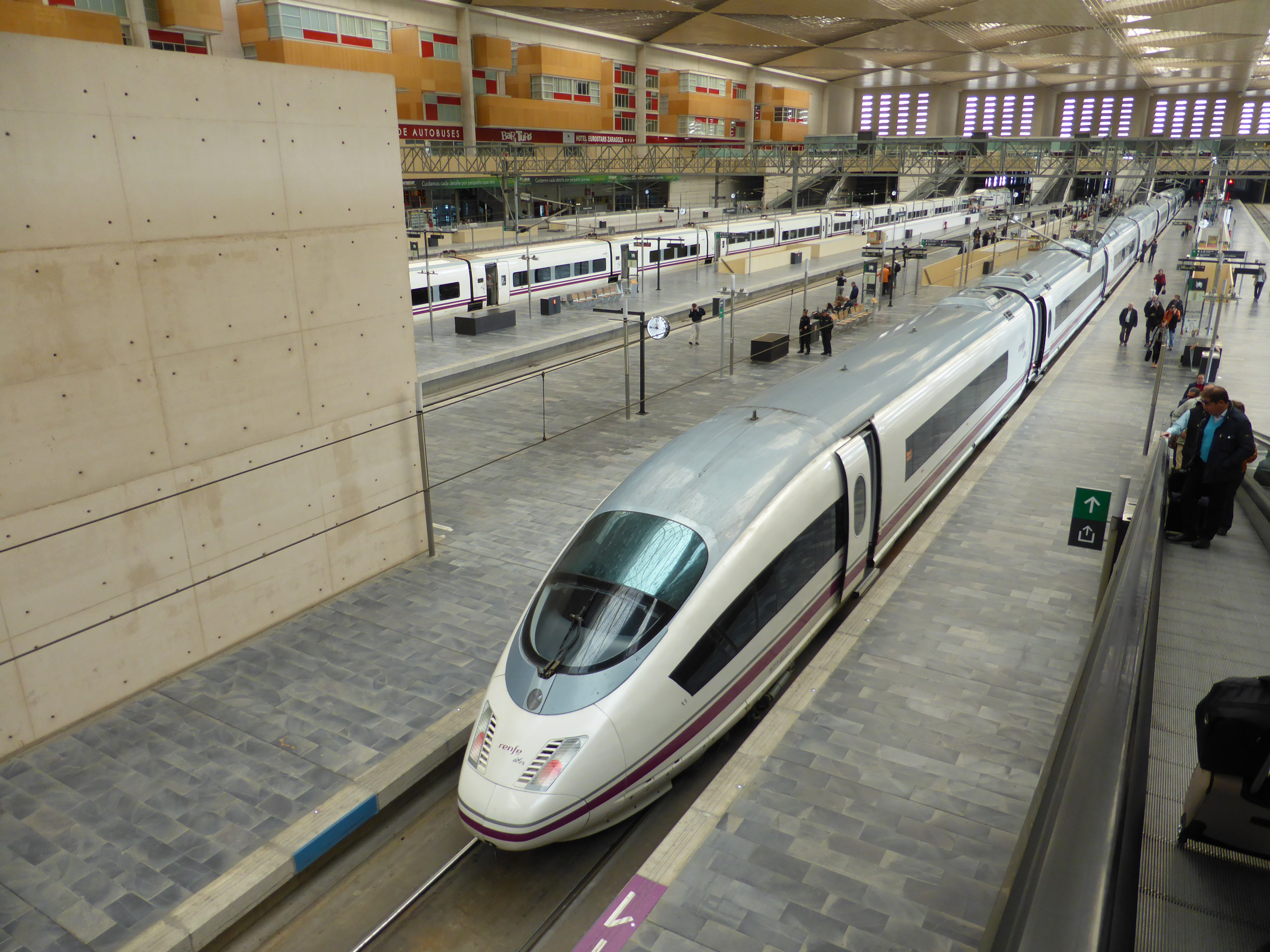 En el interior de la estación de Zaragoza-Delicias, acaba de llegar un tren AVE procedente de Madrid y con destino Barcelona. Han bajado los viajeros con destino Zaragoza. El tren es de la Serie 103 de Renfe, diseñado por Siemens, modelo Velaro E, de Renfe Operadora